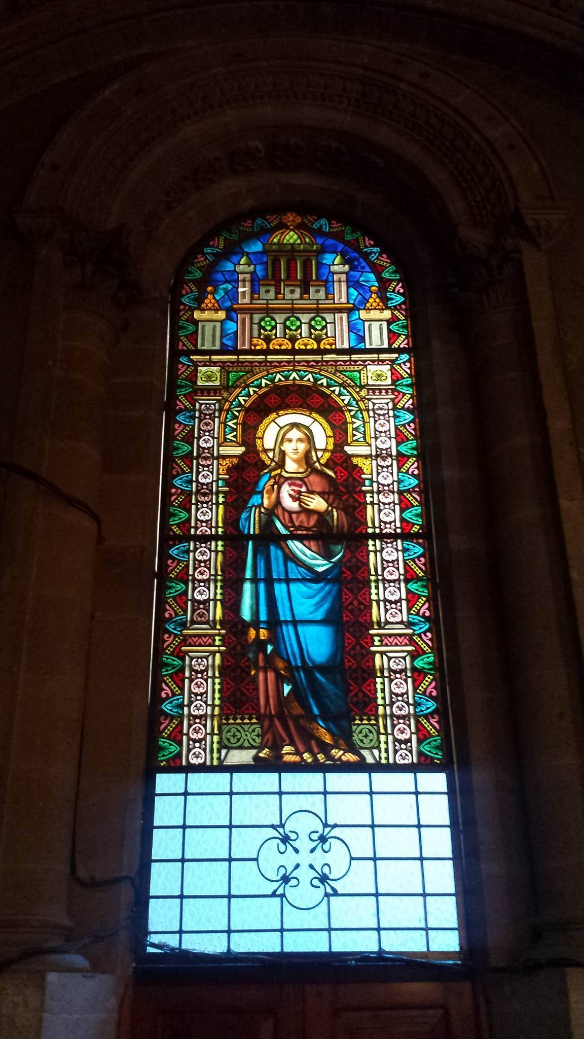 vitral